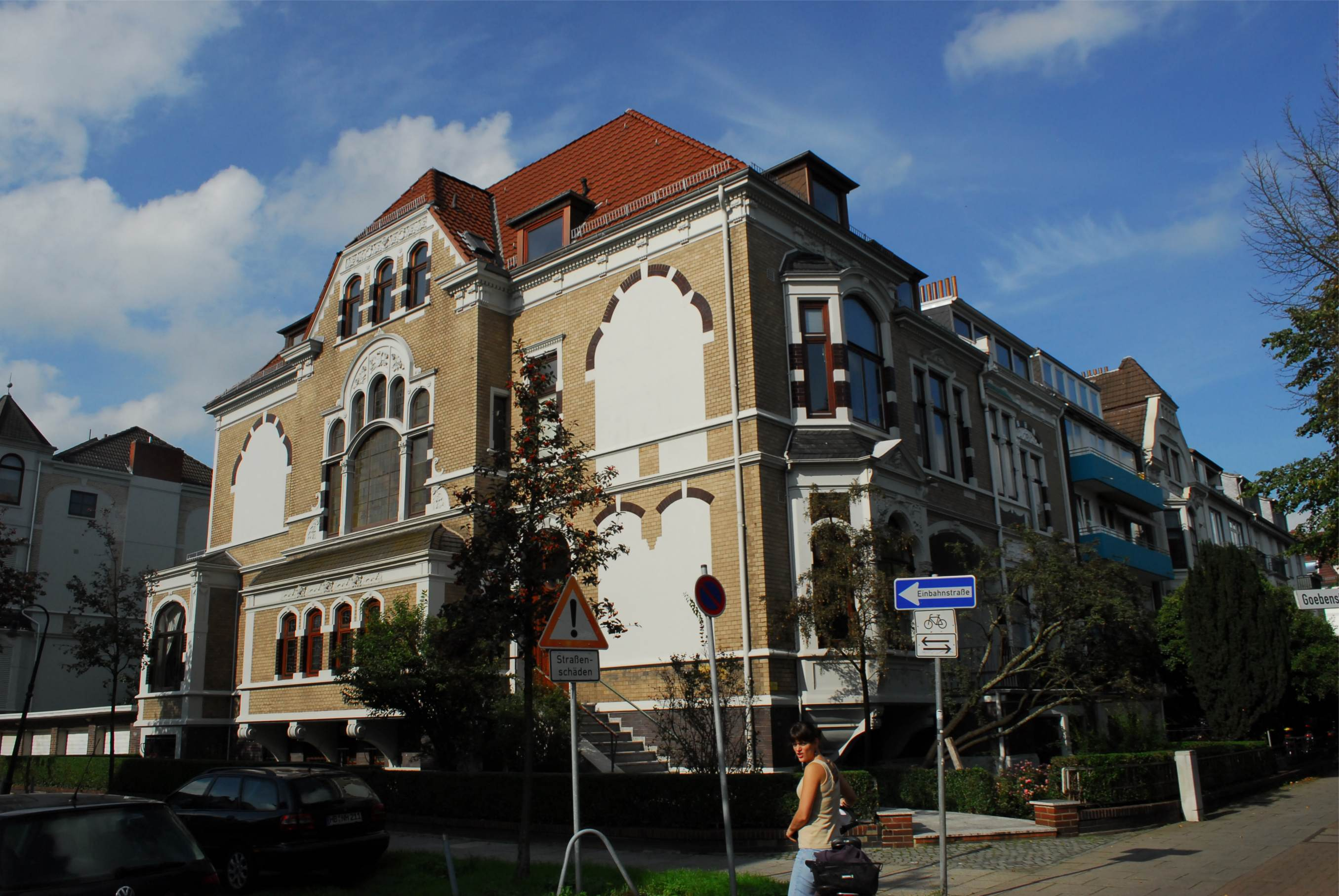 Villa Kulenkamp in Bremen, Parkallee 32 / Goebenstraße.Das abgebildete Objekt ist ein geschütztes Kulturdenkmal in der Freien Hansestadt Bremen, mit der Nr. 0996 beim Landesamt für Denkmalpflege registriert.